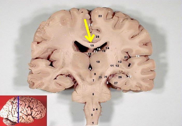 Frontal (Coronal) section of the brain emphasizing-corpus-callosum. Medulla spinalis Decussatio pyramidum Hilum nuclei olivaris inferioris Nucleus olivaris inferior Pons Arteria cerebri posterior (?) (Tractus cerebellorubralis) Nucleus ruber Ventriculus tertius Thalamus Capsula interna Putamen Capsula interna / Claustrum / Capsula extrema Nucleus caudatus (Corpus) Stria terminalis et Vena thalamostriata superior Lamina affixa / Ventriculus lateralis, Pars centralis Taenia choroidea / Plexus choroideus ventriculi lateralis Fornix, Crus Corpus callosum, Truncus Gyrus cinguli Fissura longitudinalis cerebri Gyrus frontalis superior (?) Insula Sulcus lateralis Ventriculus lateralis, Cornu temporale Hippocampus Gyrus parahippocampalis Crus cerebri Substantia nigra (font: arial black, size: 8)